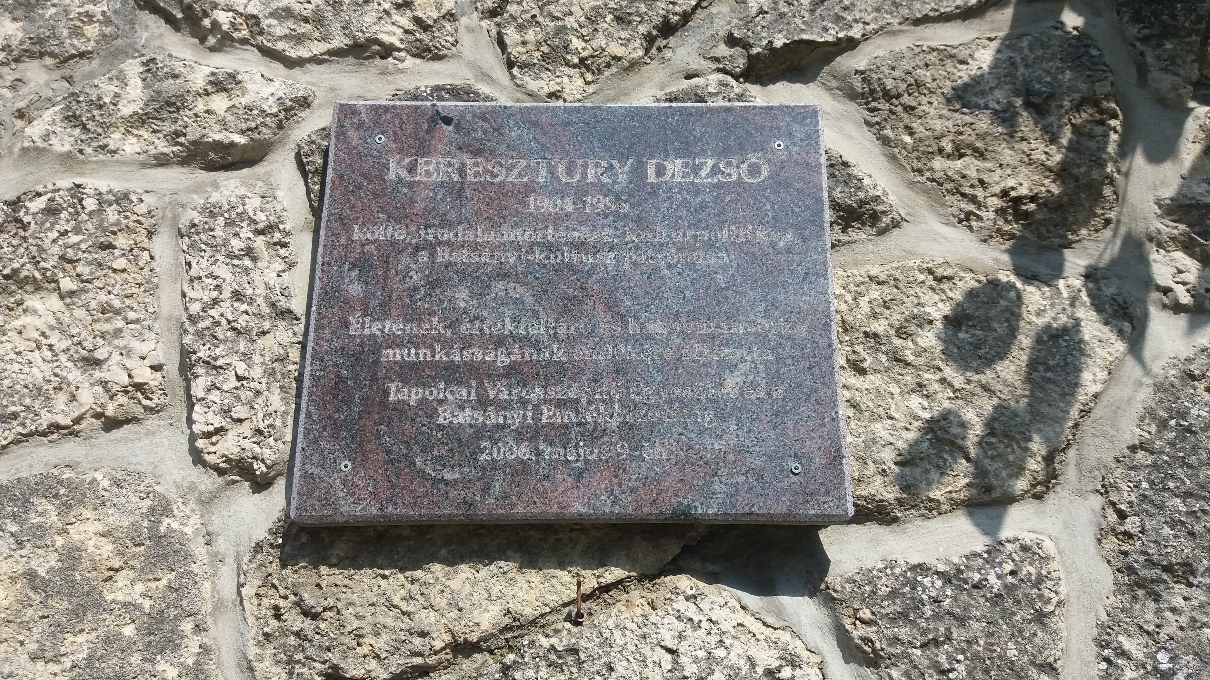 Kereszturi Dezső emléktáblája